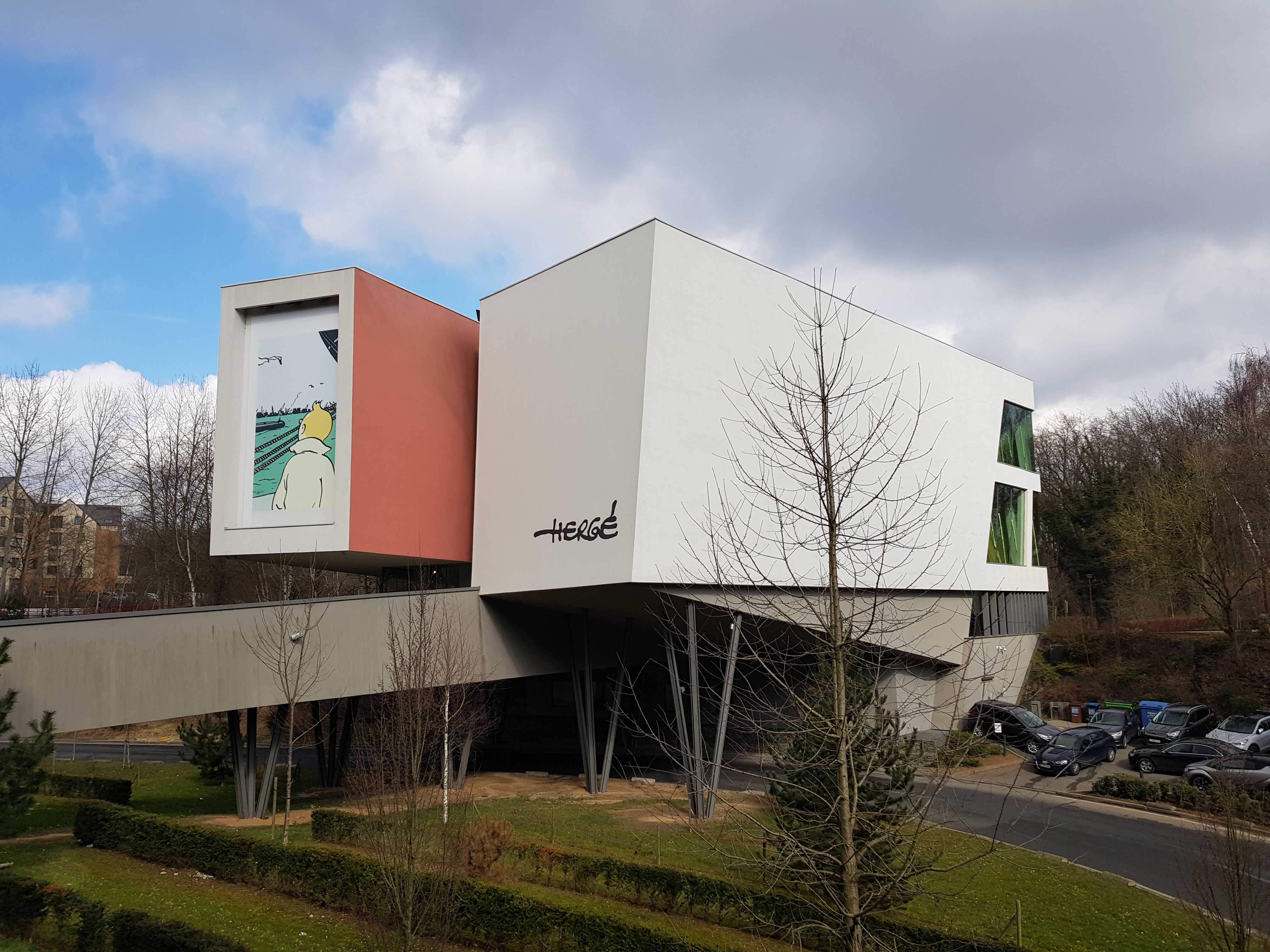 Musée Hergé, Louvain-la-Neuve, Belgique